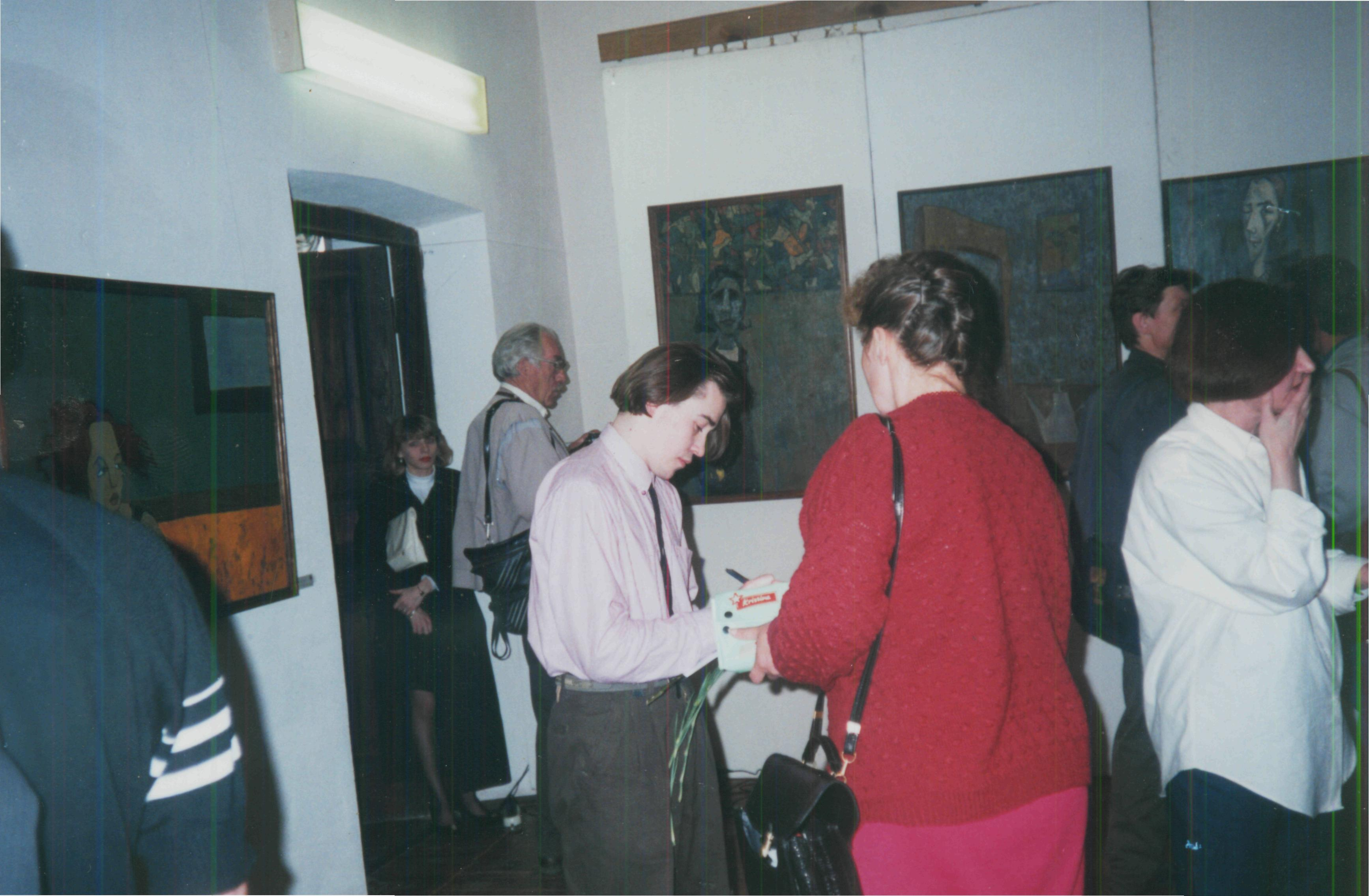 Витебский художник Олег Прусов